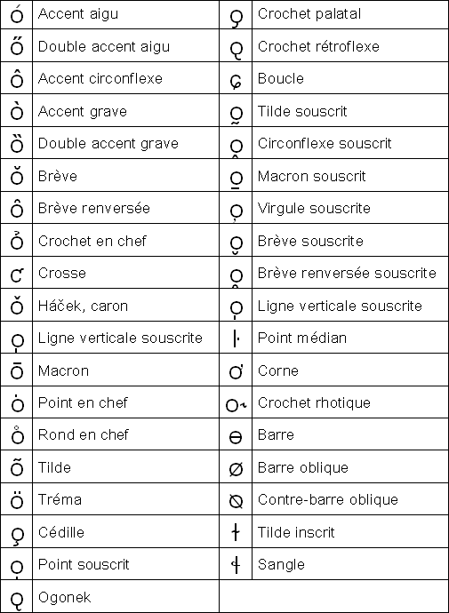 Tableau des diacritiques de l'alphabet latin